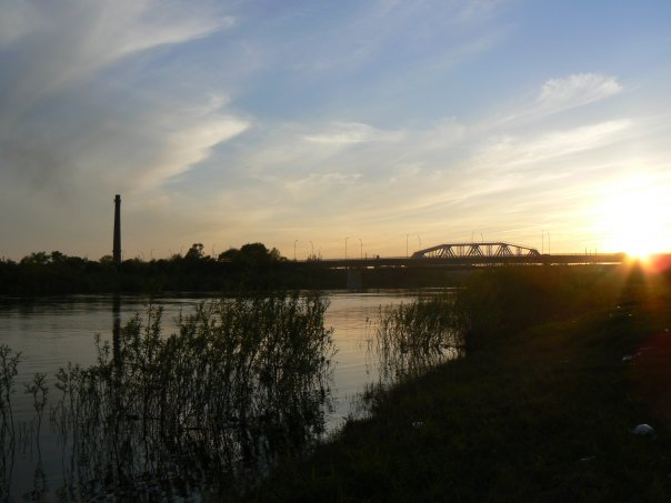 Автомобильный и железнодорожный мосты через реку Сухона.